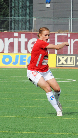 a_13_8198